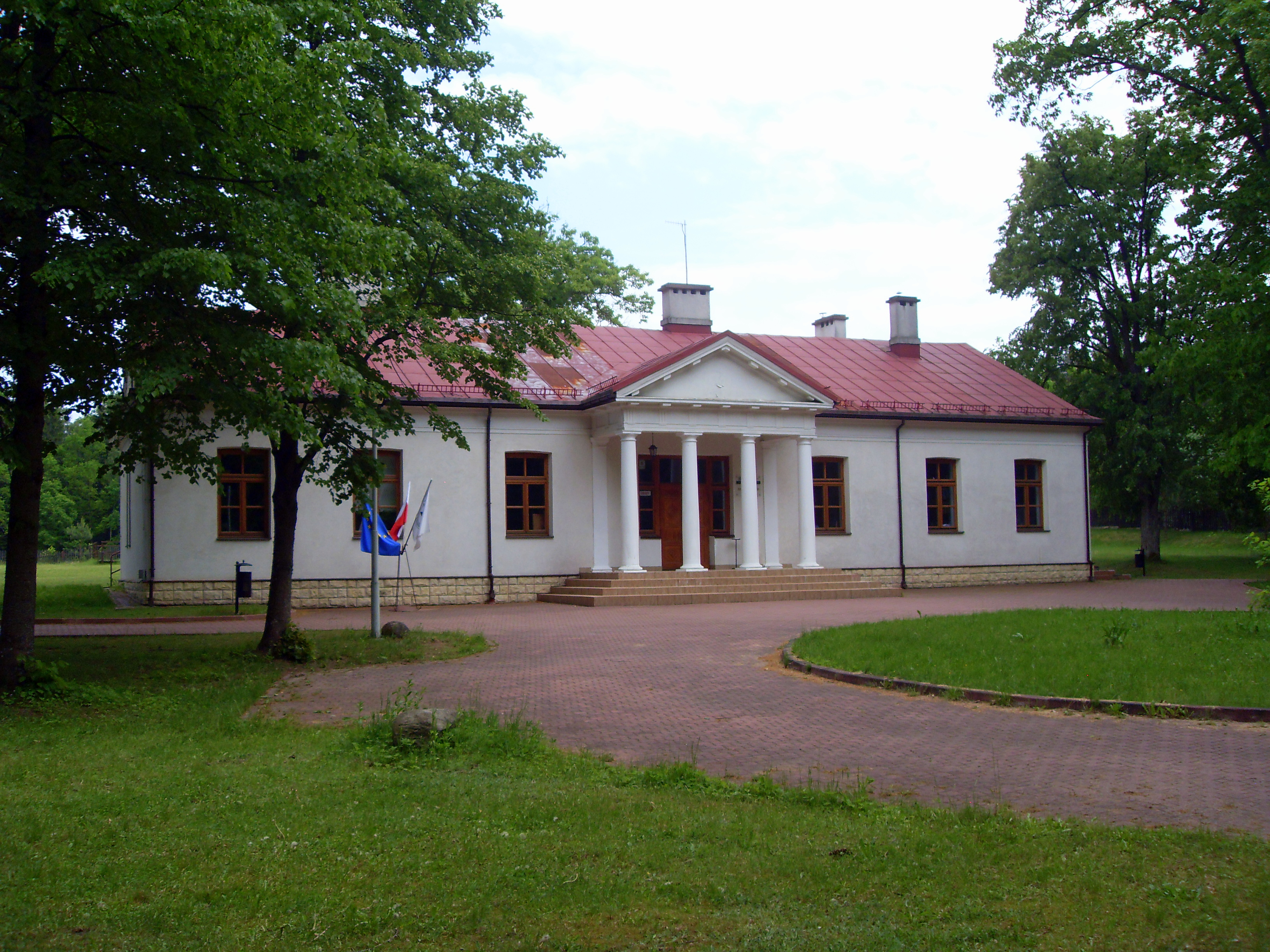 Ośrodek Edukacji Leśnej "Jagiellońskie" w Białowieży